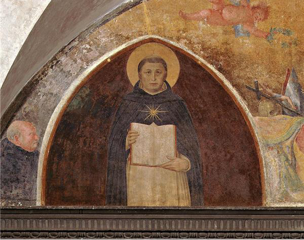 San tommaso d'aquino con la summa, il Santo mostra un libro aperto con la "Summa Theologiae"